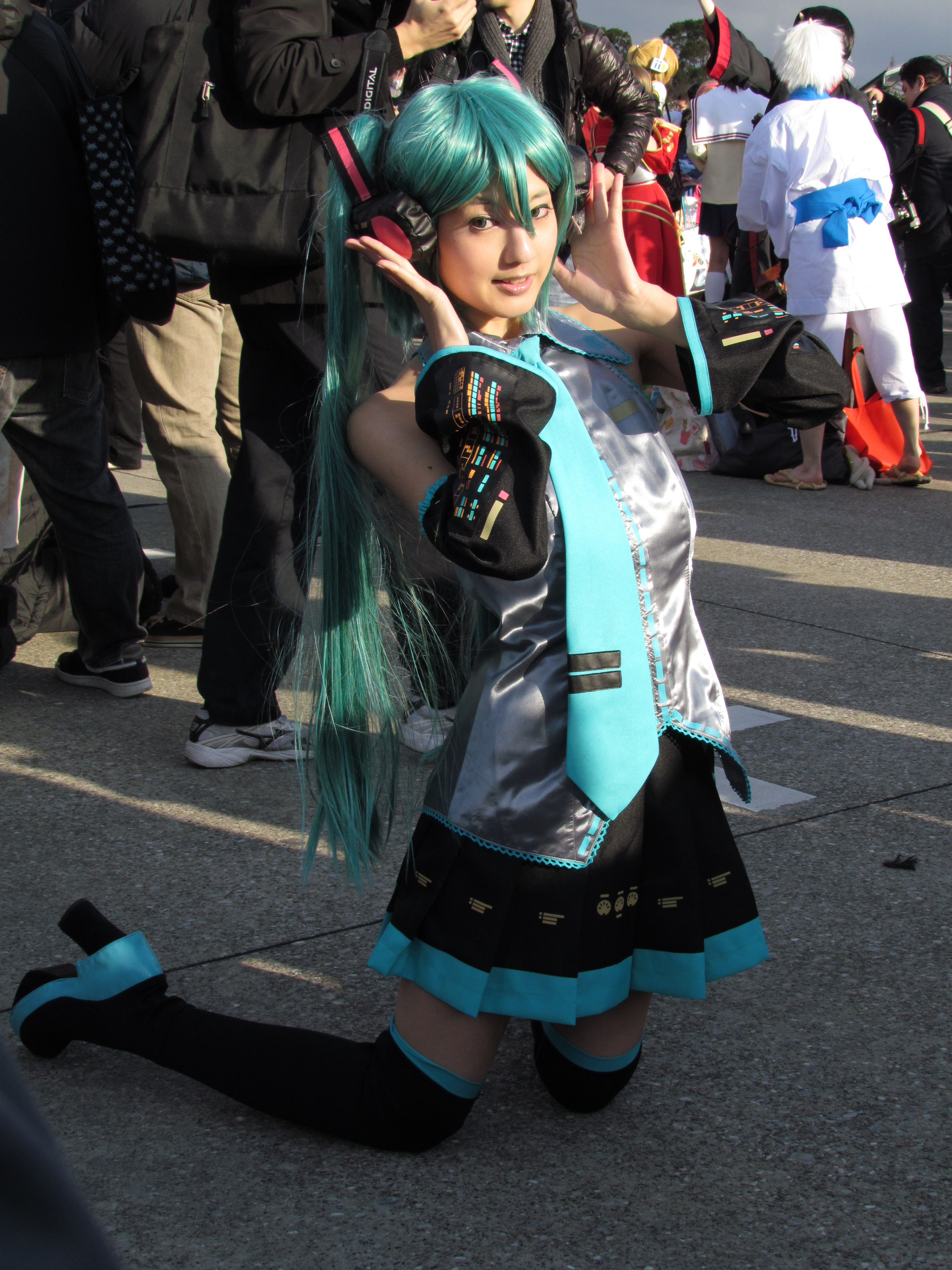 Miku Hatsune cosplay en Comiket 83.